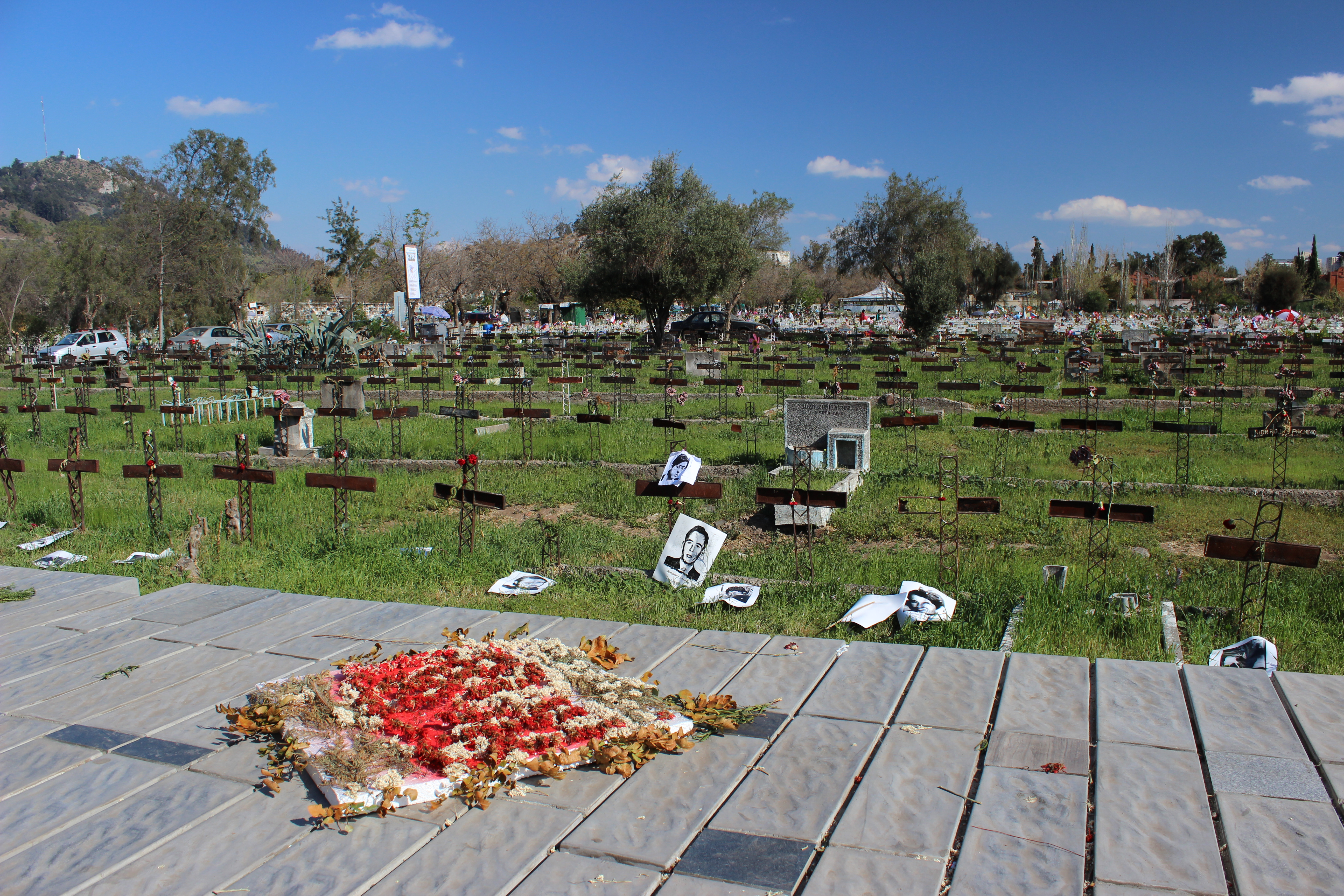 Fotografía tomada luego de la conmemoración del 11 de septiembre de 2013 This is a photo of a national monument in Chile: 1078